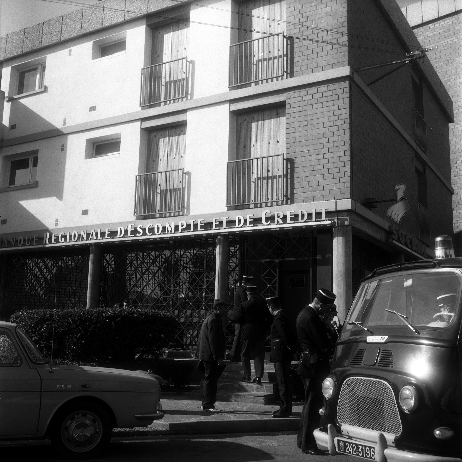 Devant la Banque régionale d'Escompte et de Crédit (BREC), place du Corps-Franc-Pomiès à Blagnac. 8 octobre 1971. Vue d'ensemble des gendarmes devant la banque, à droite fourgon de la gendarmerie (Renault Alouette). Cliché pris après le hold-up de l'agence bancaire.